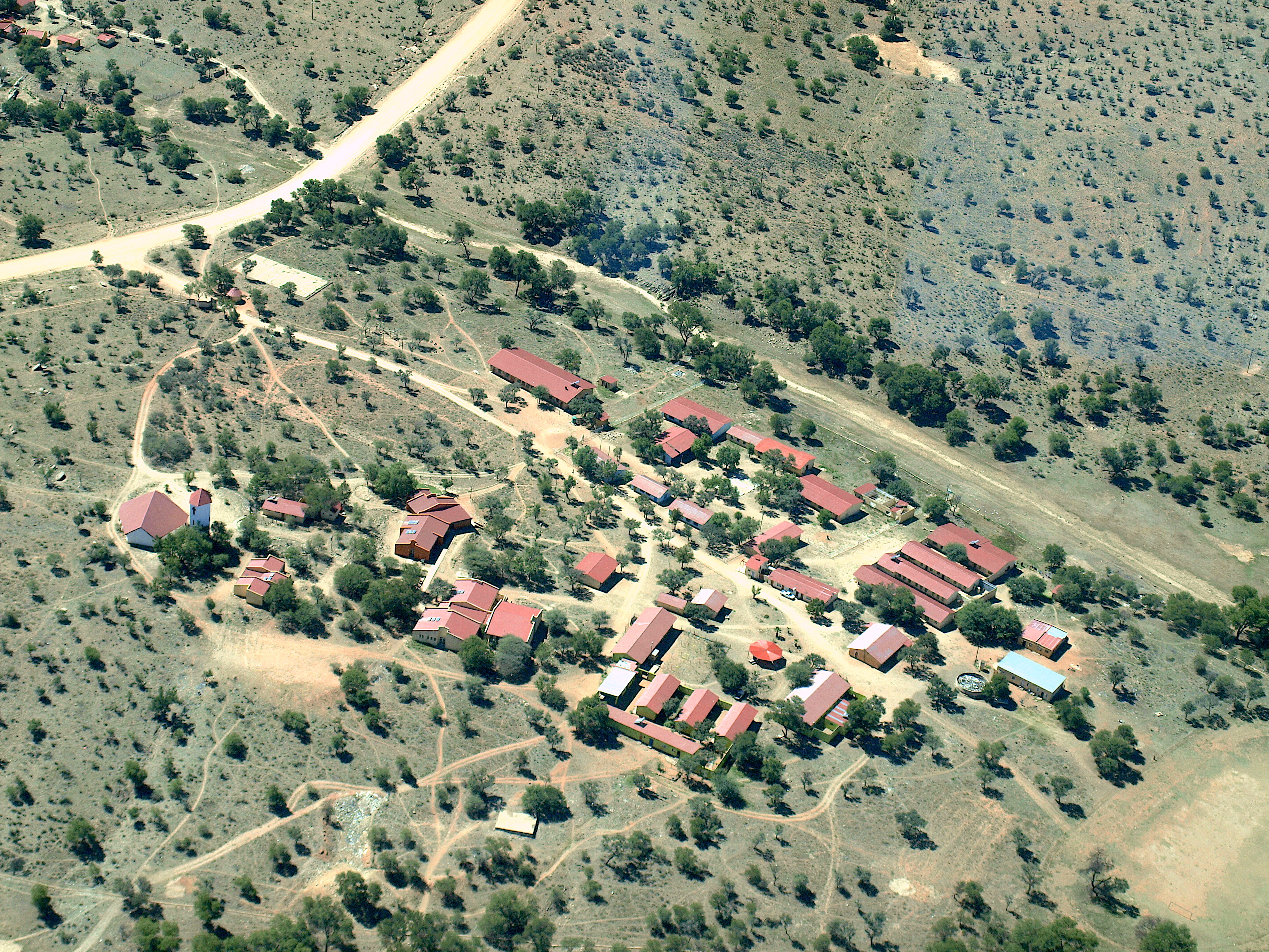 Neuheusis Namibia (2013)